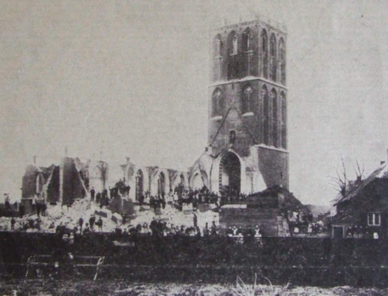 Foto uit 1898 van de uitgebrande Sint-Martinuskerk in Tegelen van onbekende fotograaf. (in 1899 werd met de heropbouw begonnen, dus moet de foto wel van 1898 zijn, het jaar van de brand)